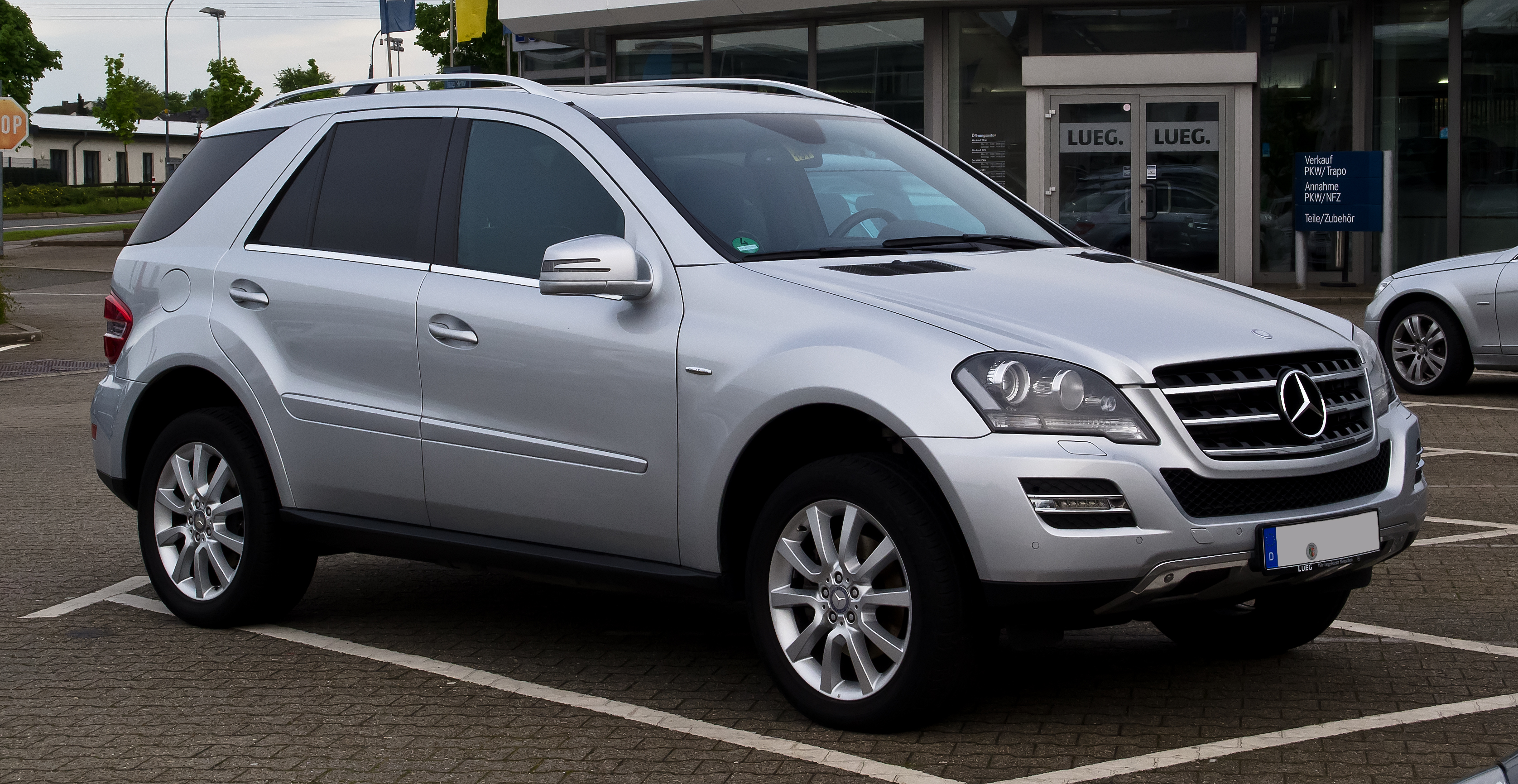 Mercedes-Benz ML 350 CDI 4MATIC Grand Edition (W 164, Facelift)